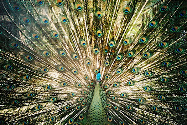 Hanoi Zoo, Vietnam